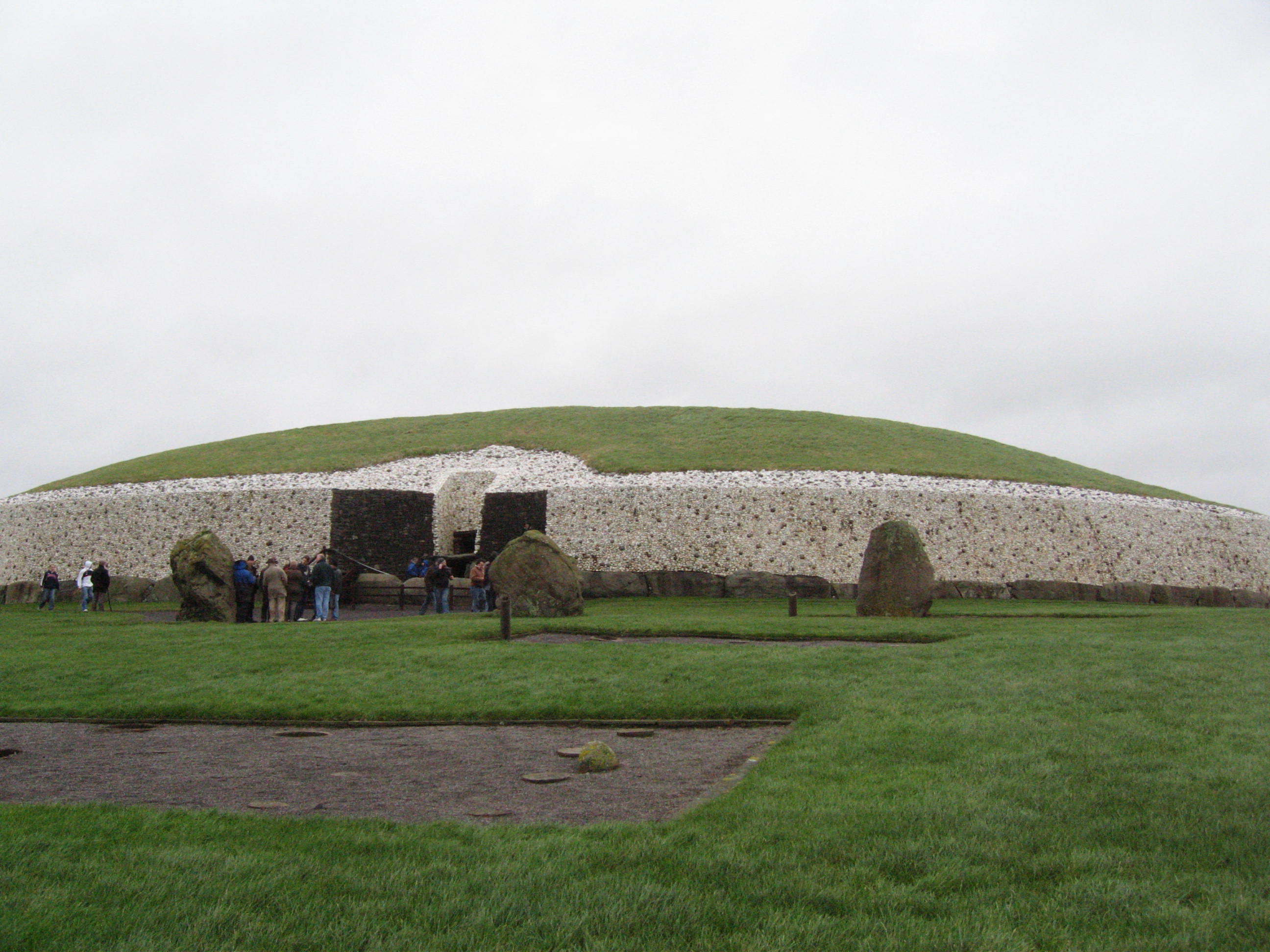 Visita Rodrigo y Pamela, feb 2007